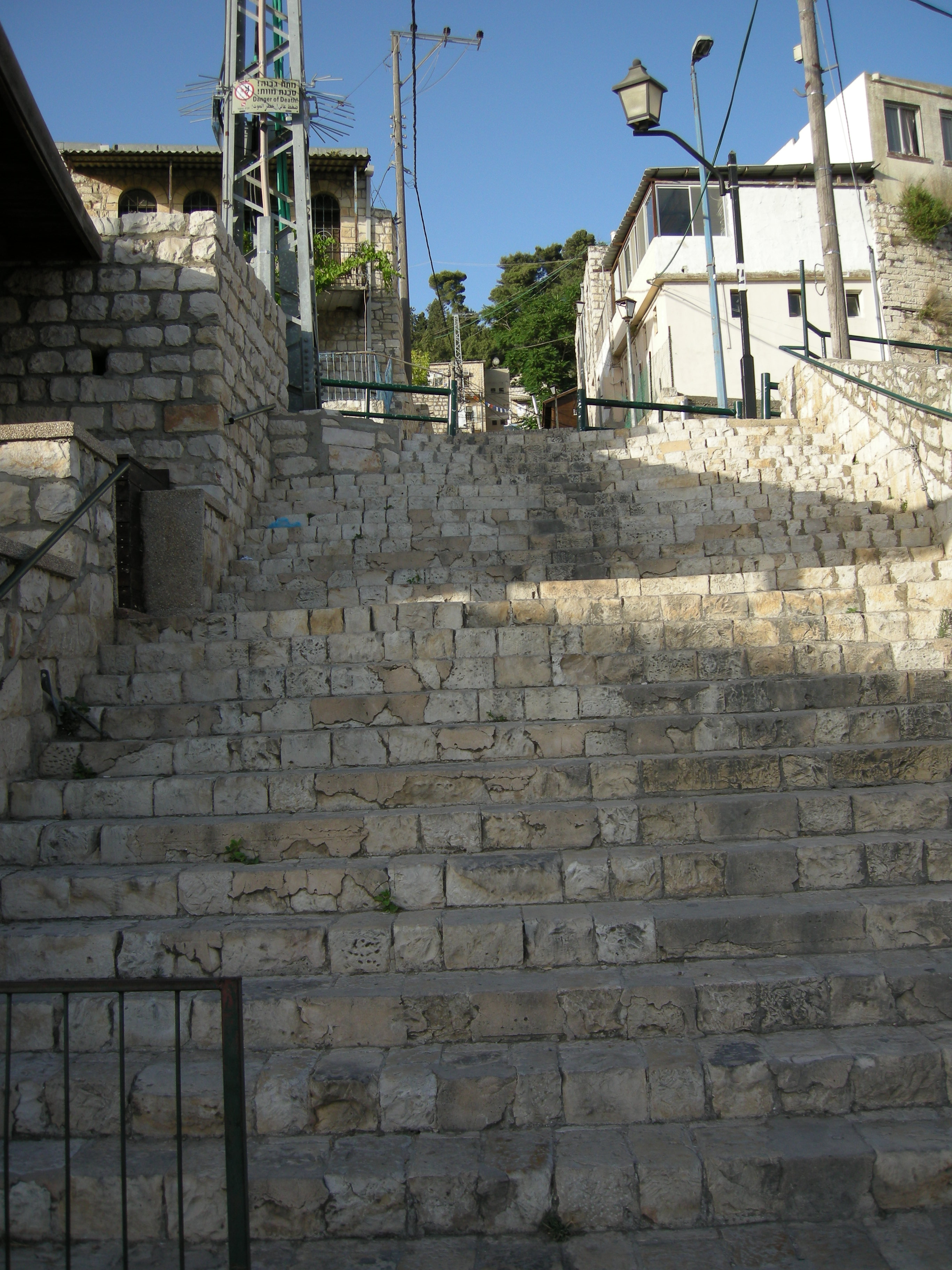 Safed